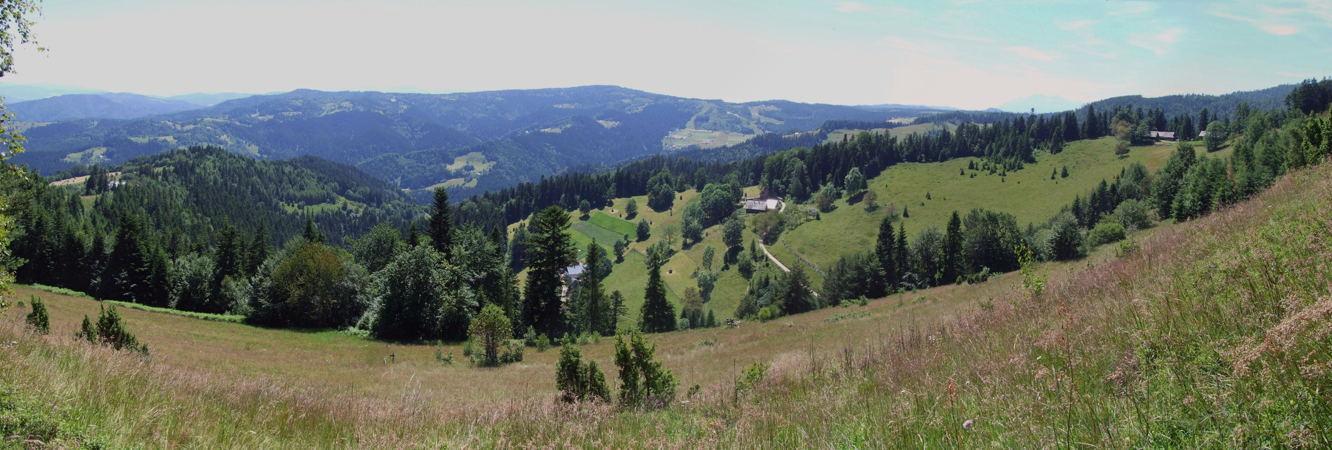 Panorama z polany Trześniowy Groń